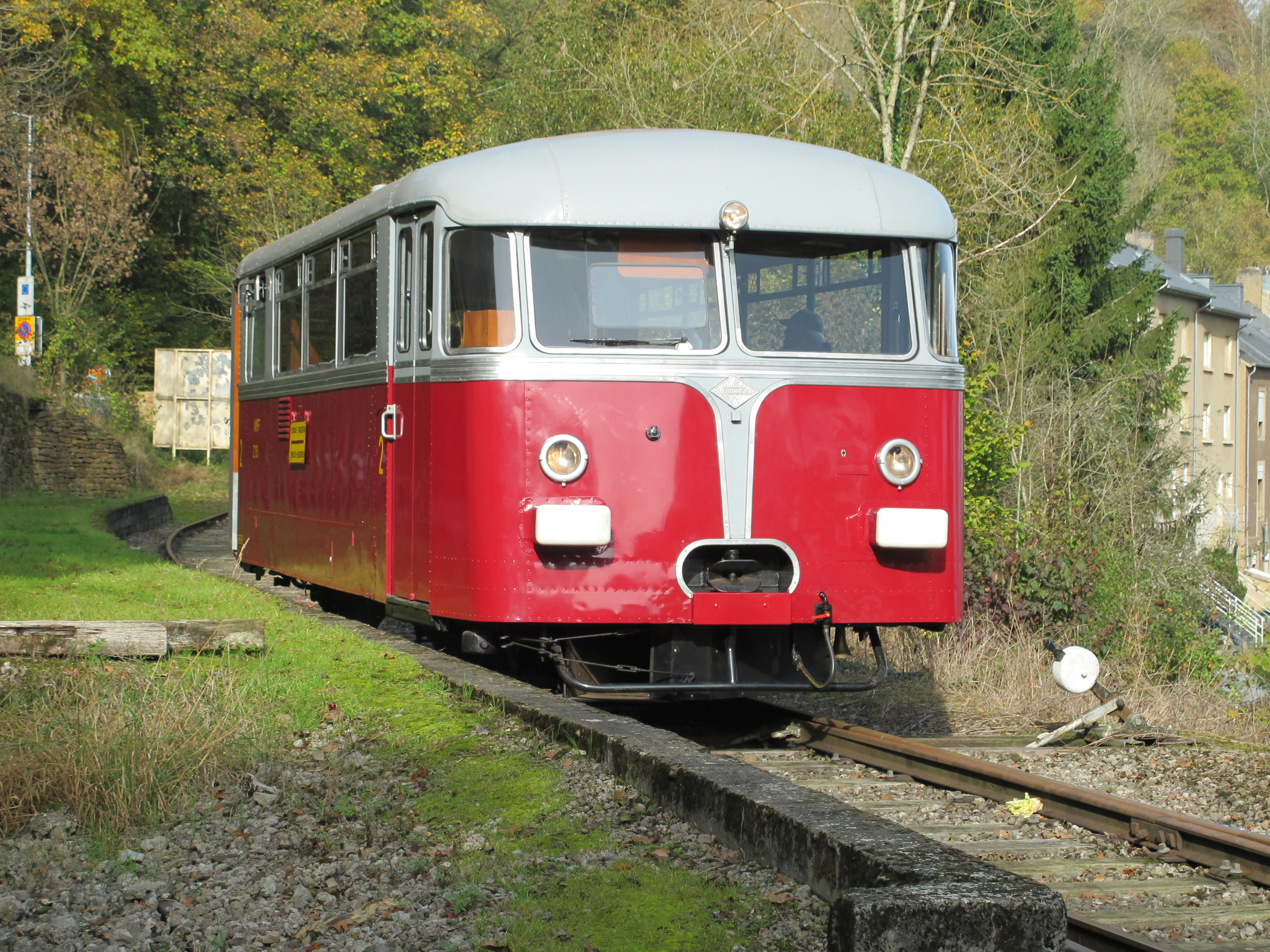 Uerdinger Schienenbus (Prototyp) in Bois de Rodange